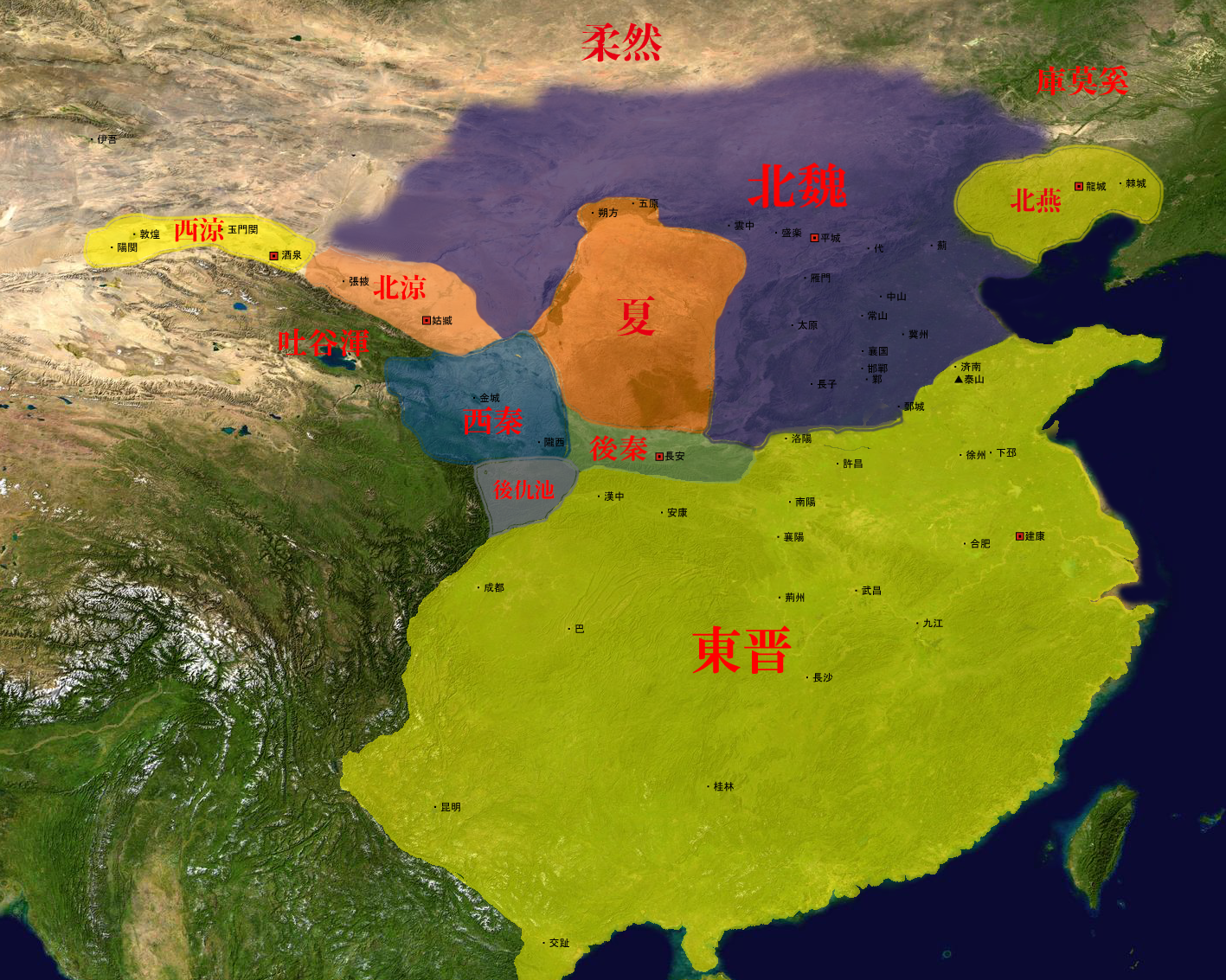 416年頃の五胡十六国時代の地図